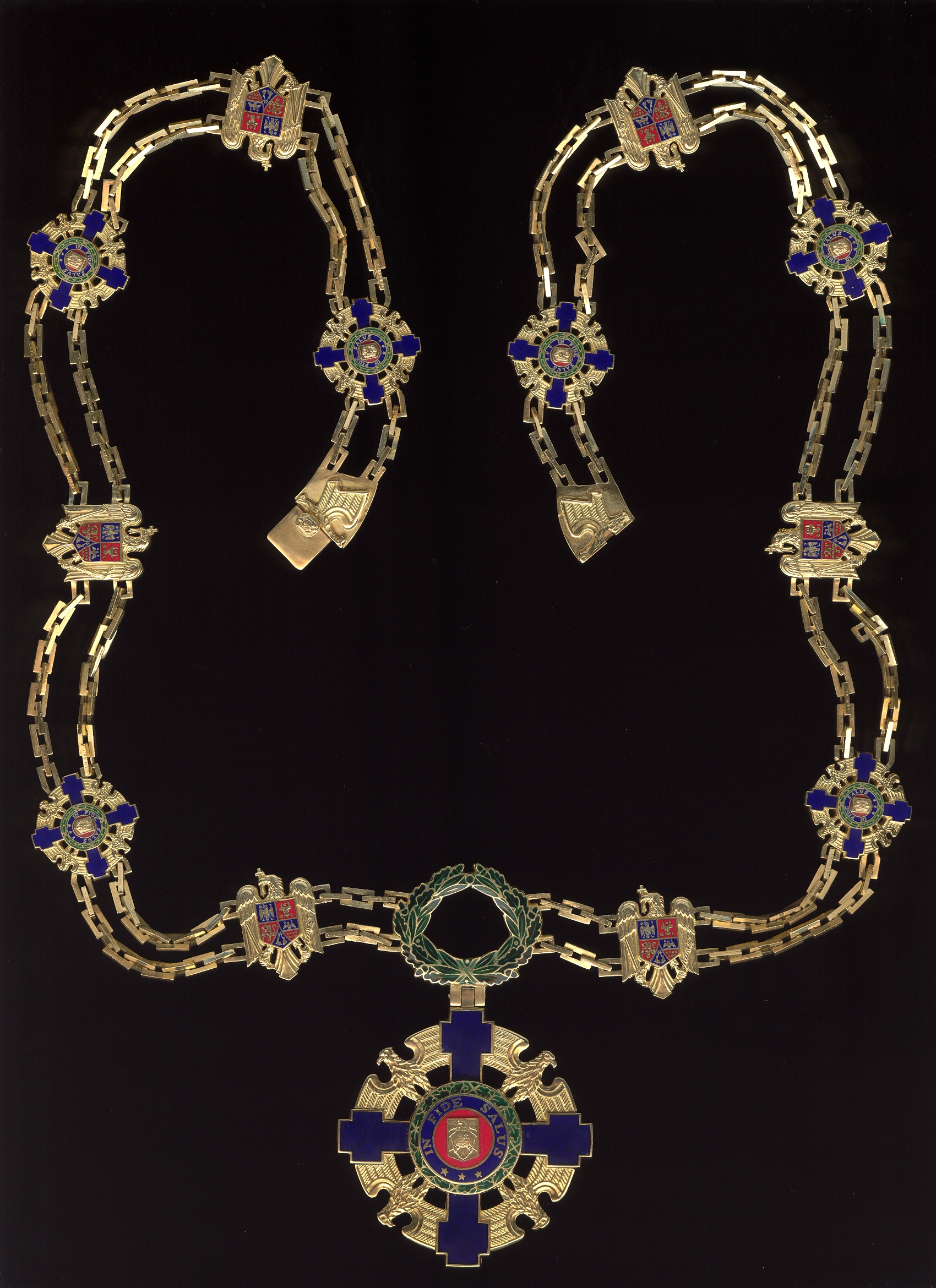 Keten Orde van de Ster van Roemenie